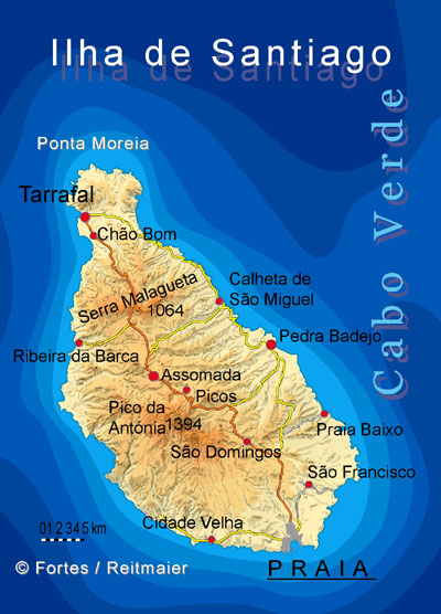 Map of Santiago Island - Cabo Verde